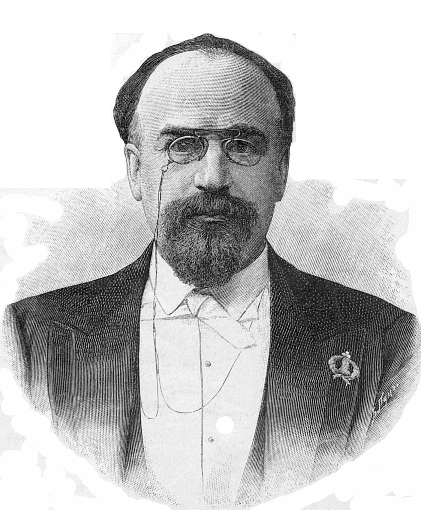 Утин Евгений Исаакович, русский адвокат, публицист, военный корреспондент